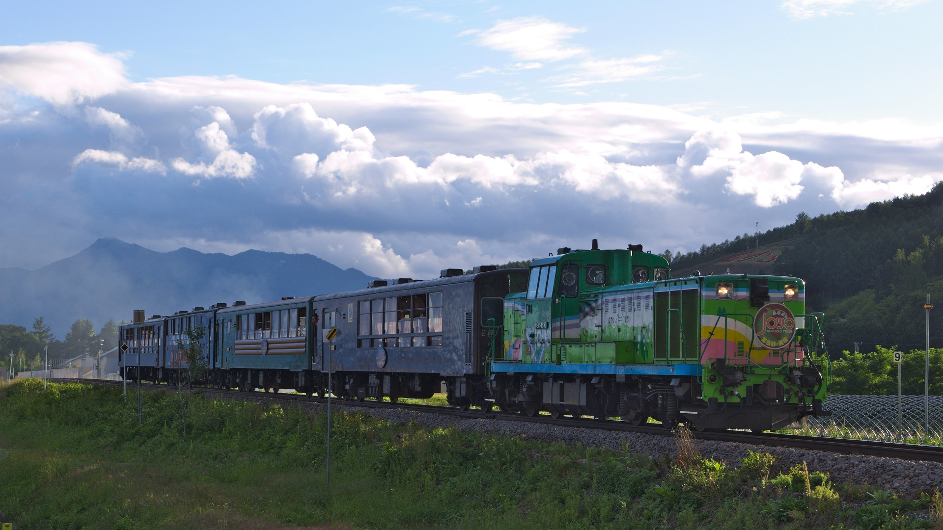 中富良野駅～ラベンダー畑駅間を走行する富良野･美瑛ノロッコ号